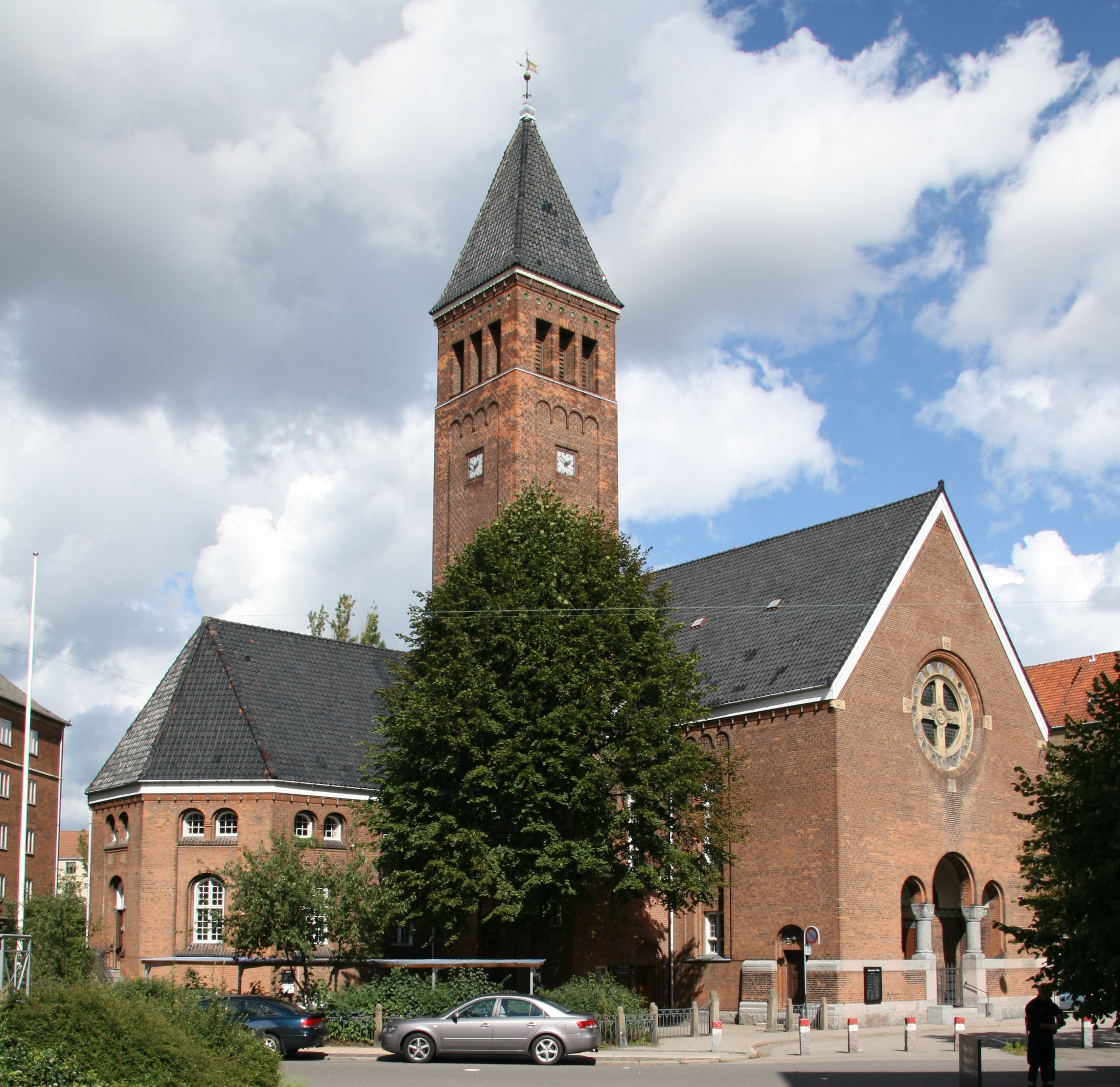 Mariendals Kirke in Copenhagen, Denmark.